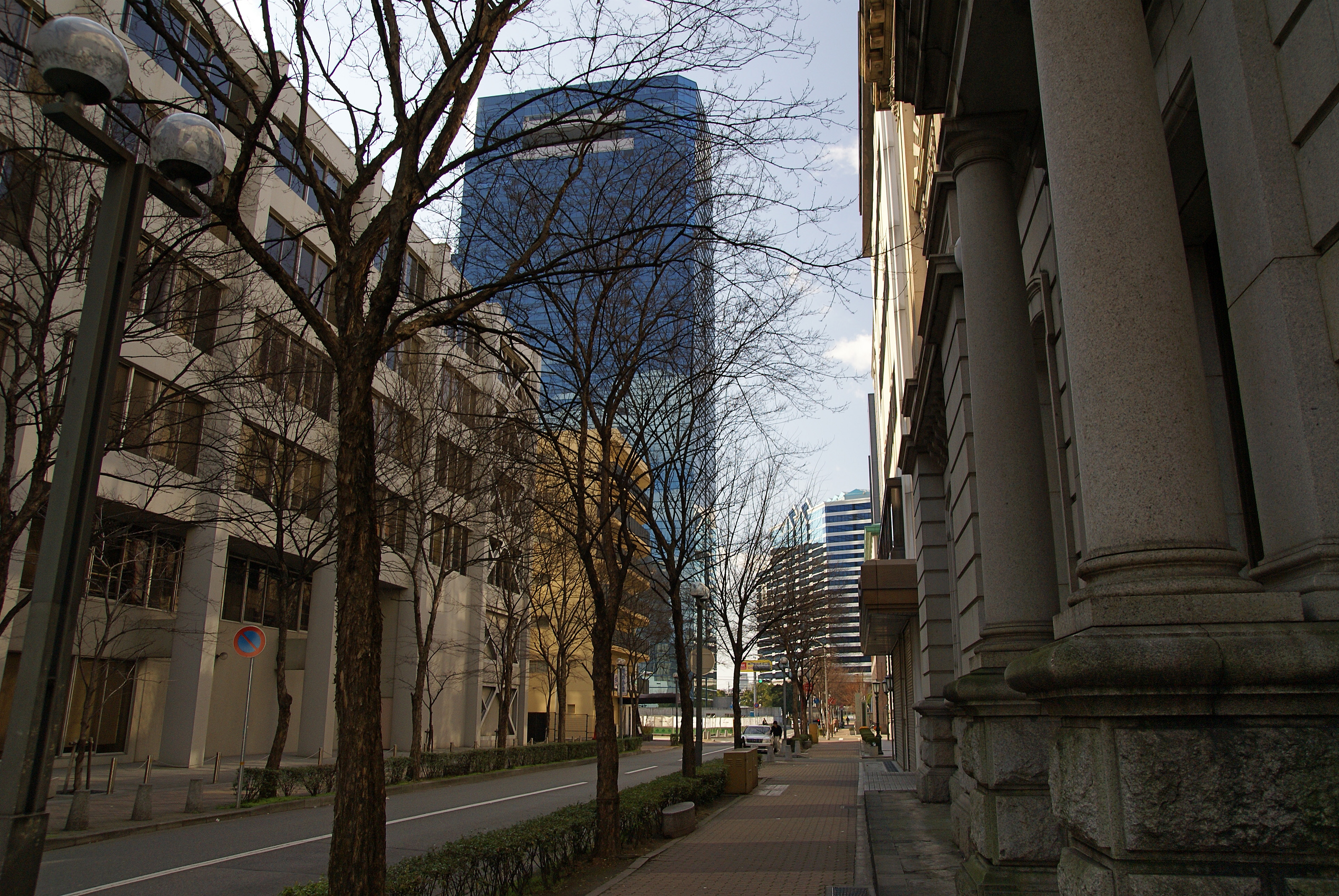 Sakaemachi street in Kobe, Hyogo, Japan